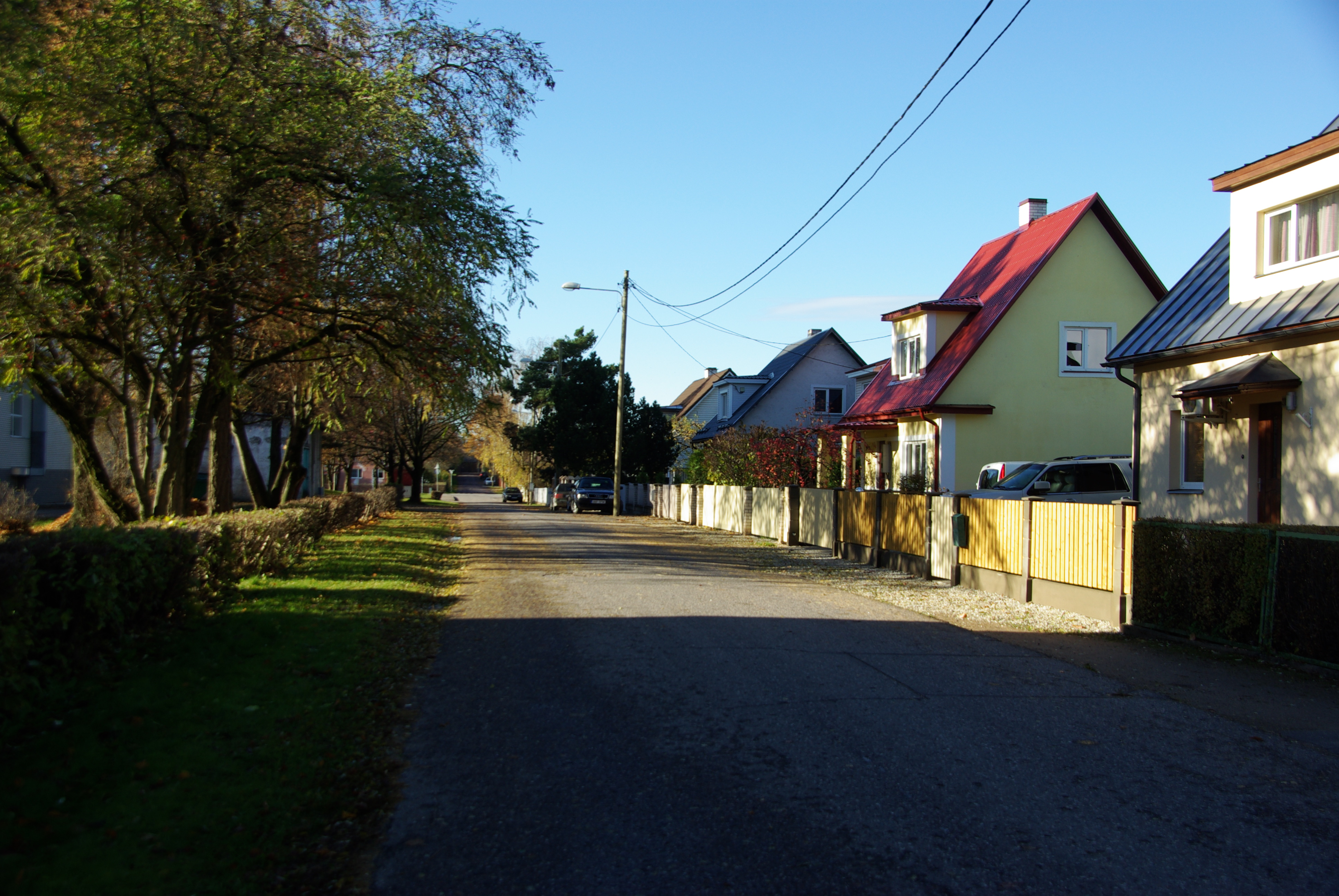 tänav Tartus Tammelinnas